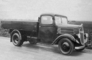 Střední nákladní automobil Škoda 256 D.